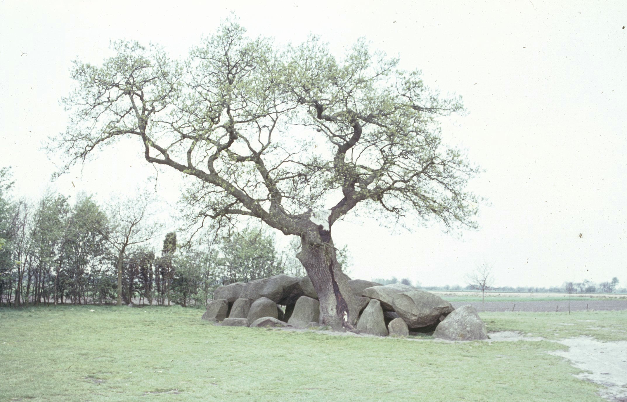 HUNEBED: OUDE BOOM EN HUNEBED ACHTER DE HERVORMDE KERK